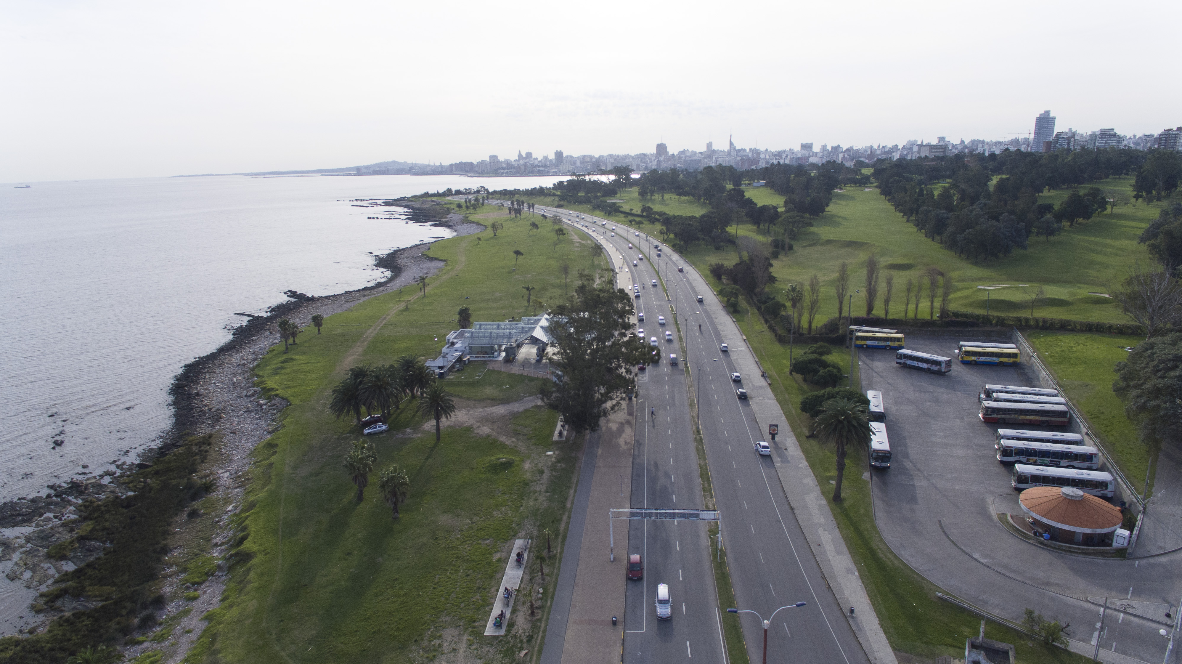 Rambla de Punta Carretas desde el faro al noreste.